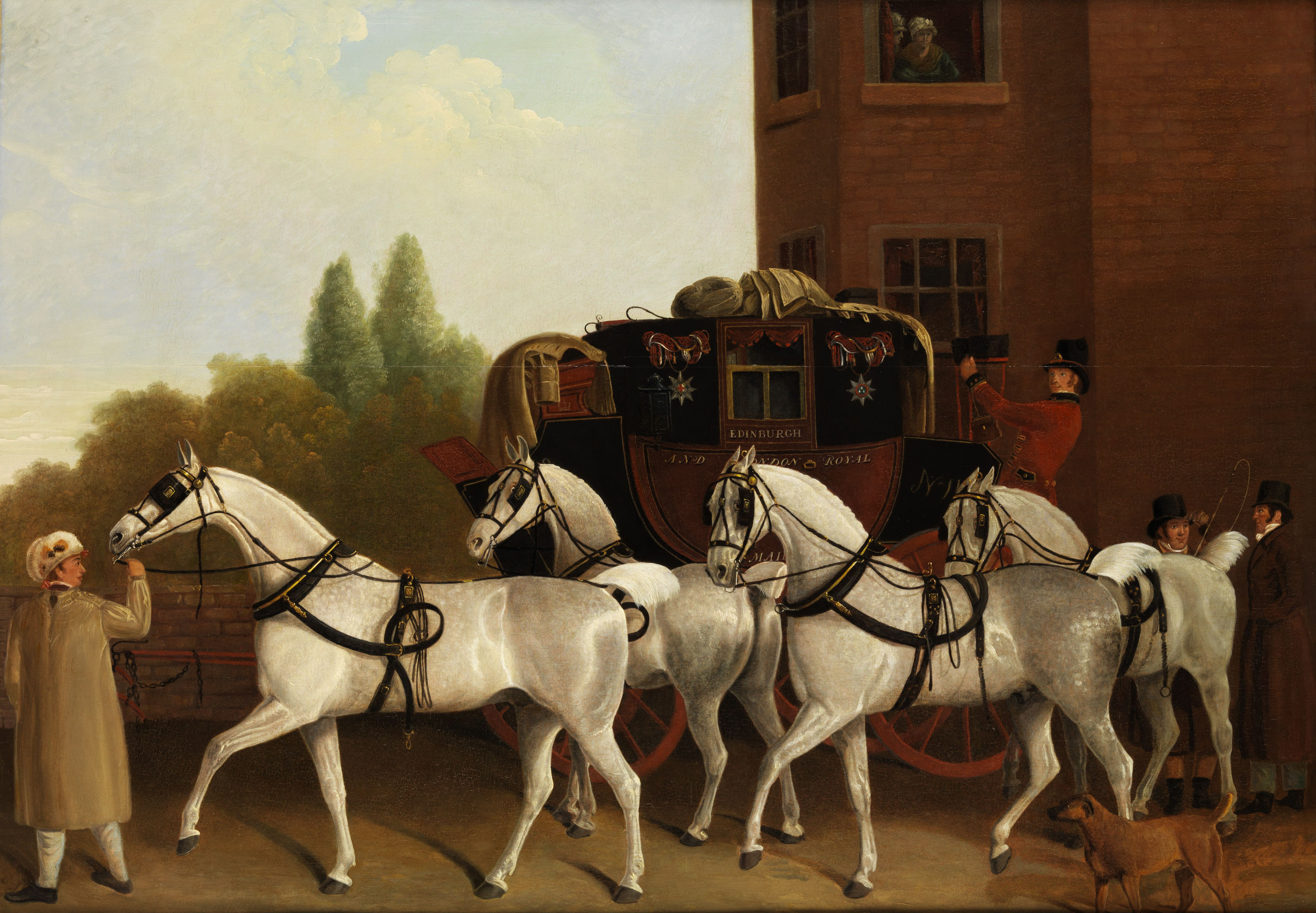 Öl auf Holz mit zwei breiten Parkettierleisten. 70 x 92 cm.